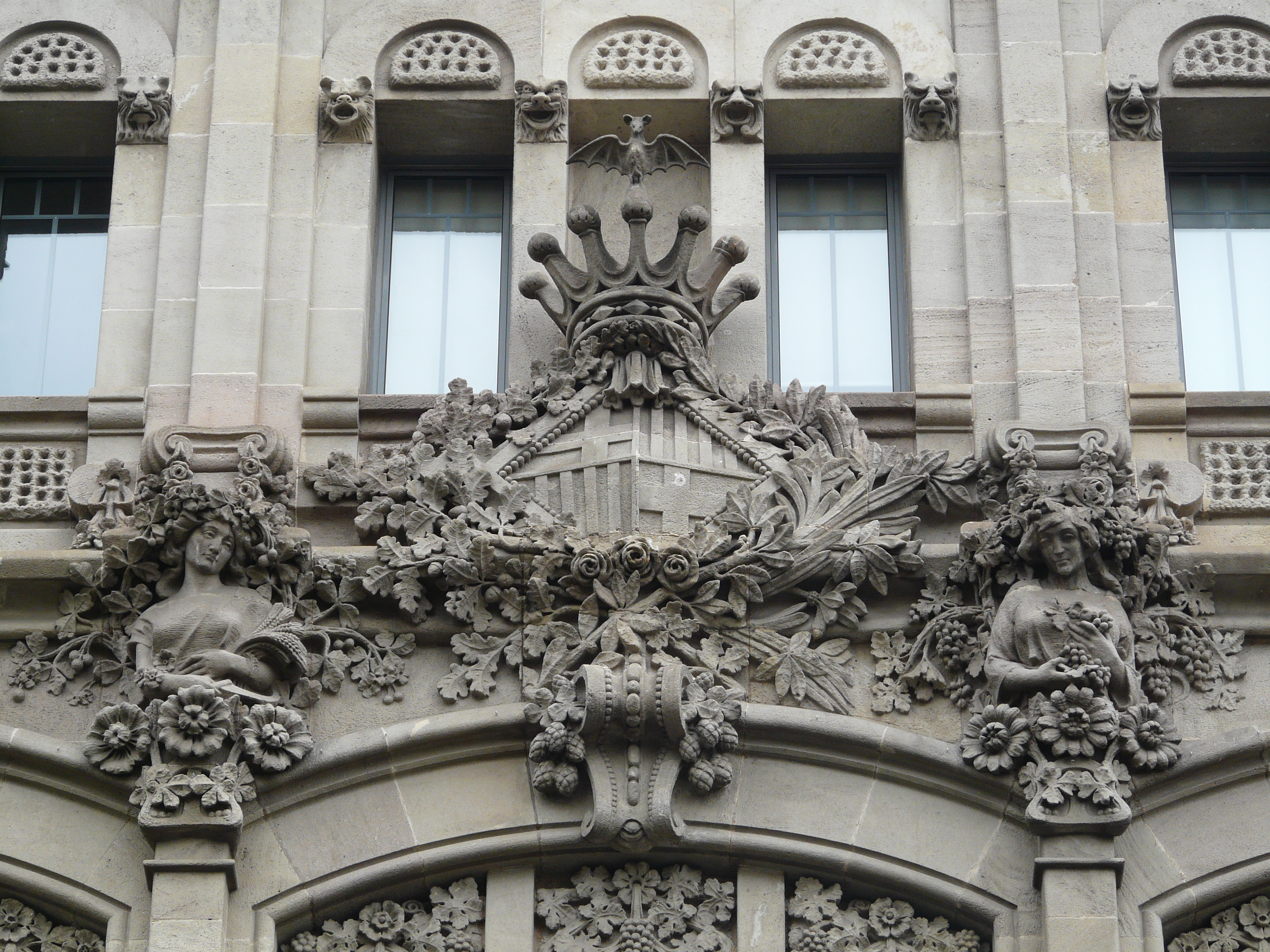 Antiga Tinença d'Alcaldia d'Hostafrancs i Seu del Districte (Barcelona) Object location41° 22′ 31.3″ N, 2° 08′ 32.09″ E